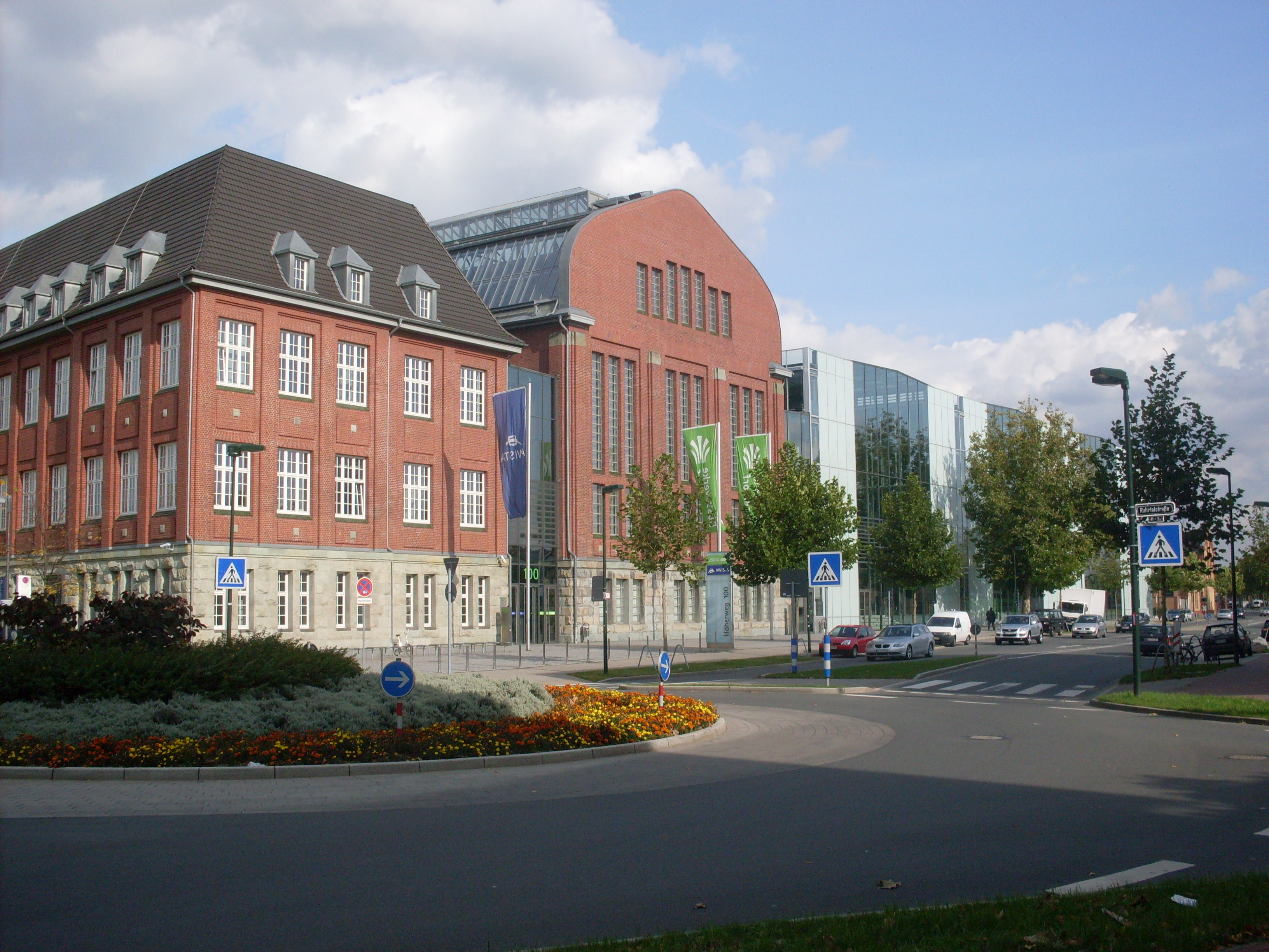 Stadtwerke Düsseldorf, Hauptsitz am Höherweg